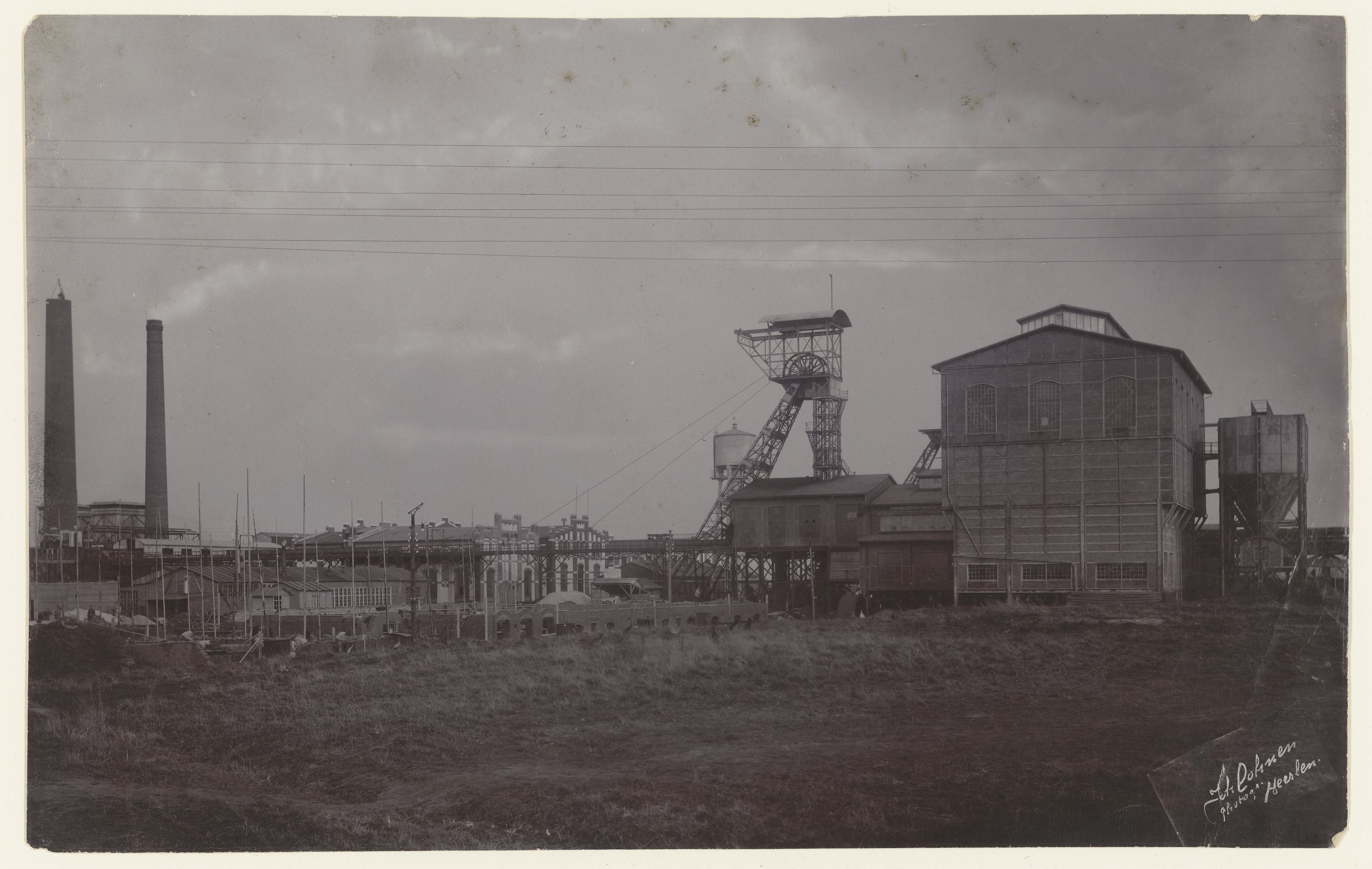 IdentificatieTitel(s): Steenkolenmijn Wilhelmina in TerwinselenObjecttype: foto Objectnummer: RP-F-00-6000Opschriften / Merken: signatuur, recto rechtsonder, in zwarte inkt op negatief geschreven, in wit gedrukt: ‘Joh Cohnen Photogr. Heerlen’annotatie, verso, potlood, penOmschrijving: Gezicht op Staatsmijn Wilhelmina in Terwinselen, Limburg.VervaardigingVervaardiger: fotograaf: Joh. CohnenPlaats vervaardiging: HeerlenDatering: ca. 1906 - ca. 1920Fysieke kenmerken: daglichtcollodiumzilverdruk op fotopapier op kartonMateriaal: papier fotopapier karton Techniek: daglichtcollodiumzilverdrukAfmetingen: afbeelding: h 145 mm × b 228 mmOnderwerpWanneer: 1906 - 1969Waar: TerwinselenVerwerving en rechtenCredit line: Schenking van de heer W. Diepraam, AmsterdamVerwerving: schenking 1996Copyright: Publiek domein